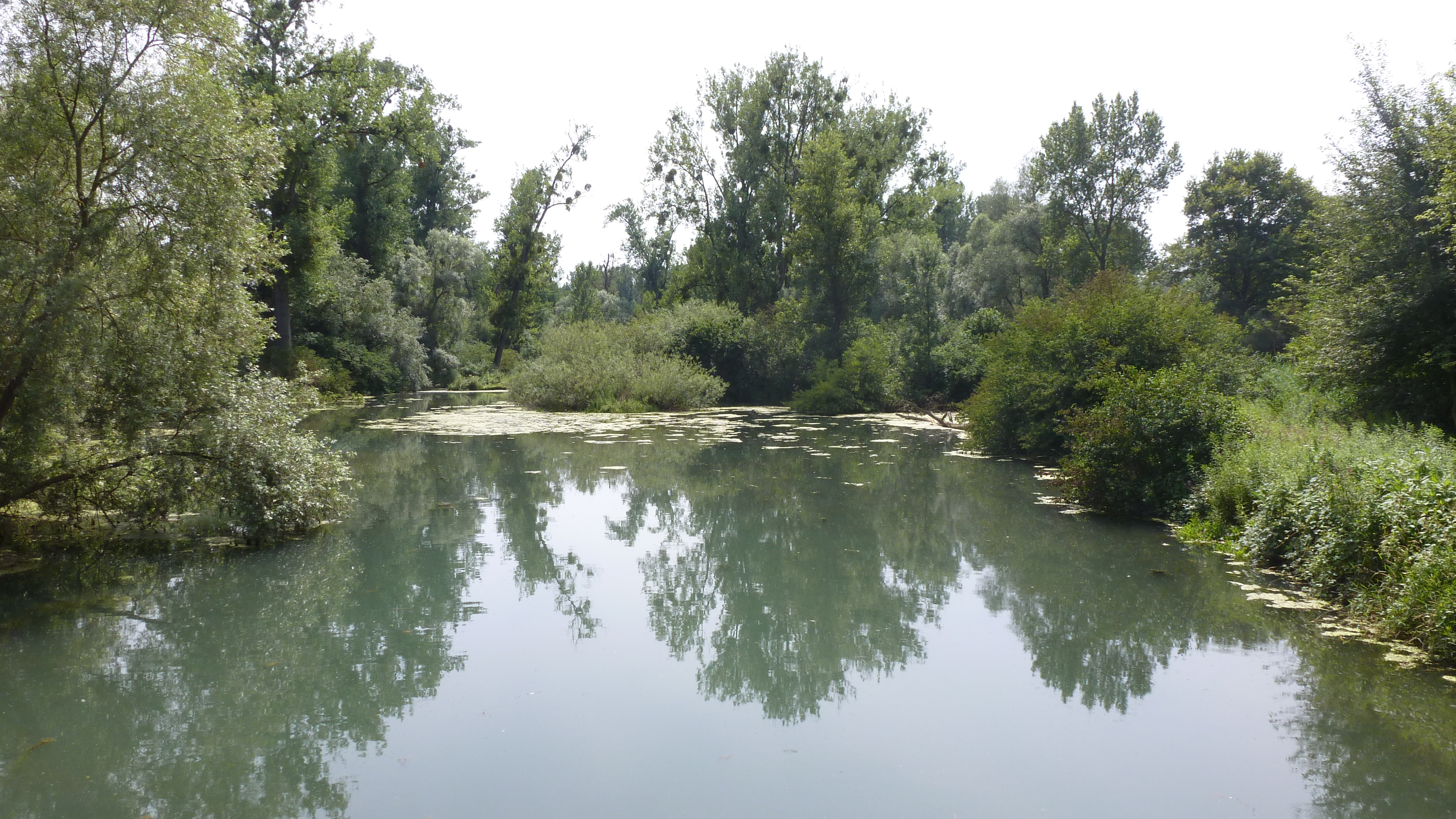 Réserve naturelle de l’île du Rohrschollen à Strasbourg.